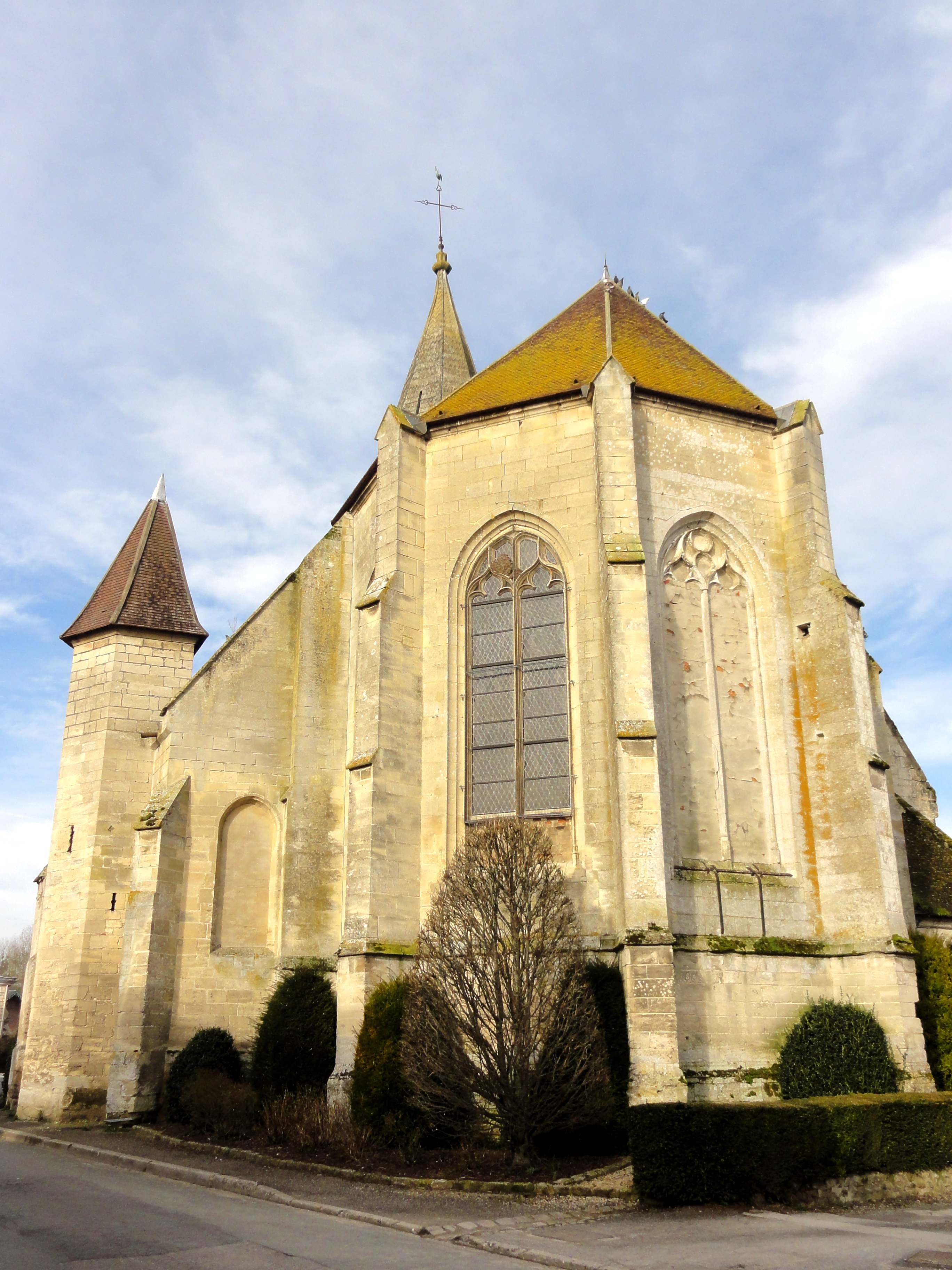 Voir titre.